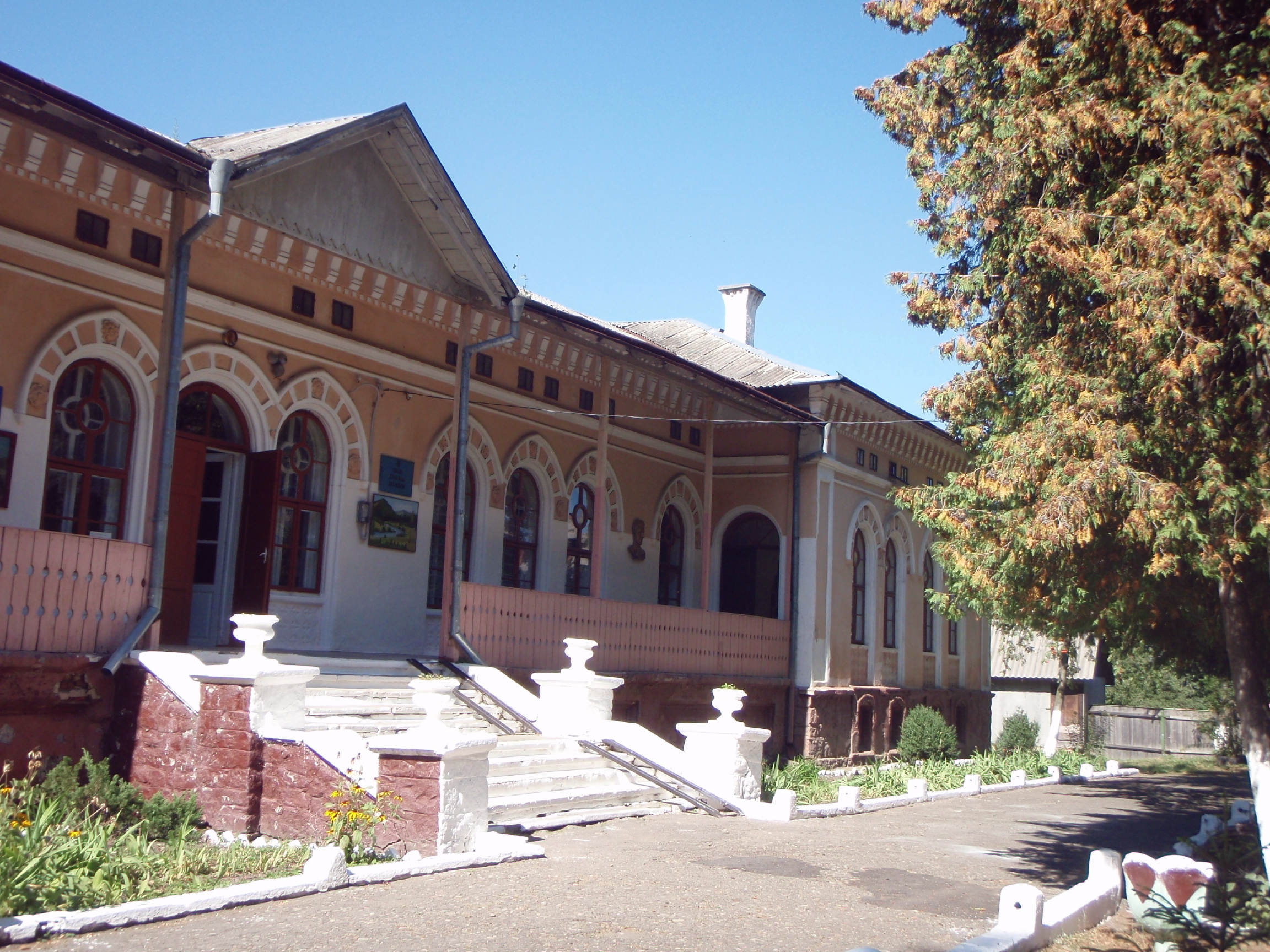 Вижниця, будівля краєзнавчого музею